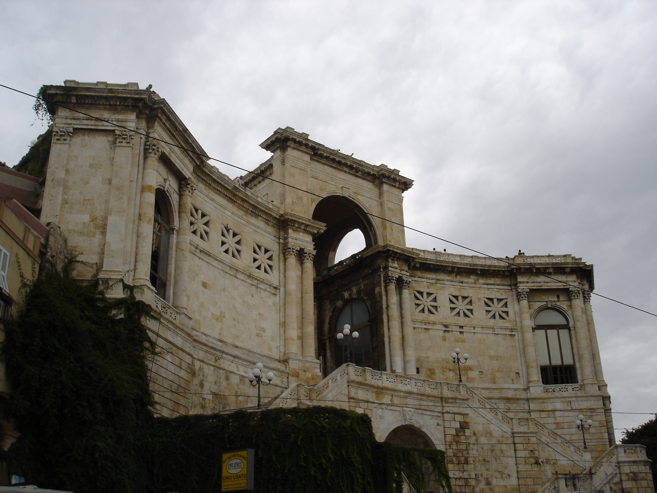 Cagliari, Sardegna, Italia